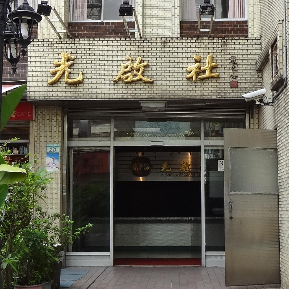 中文（台灣）: 光啟文教視聽節目服務社大樓大門，上方懸掛嚴家淦題字的鑄字招牌。